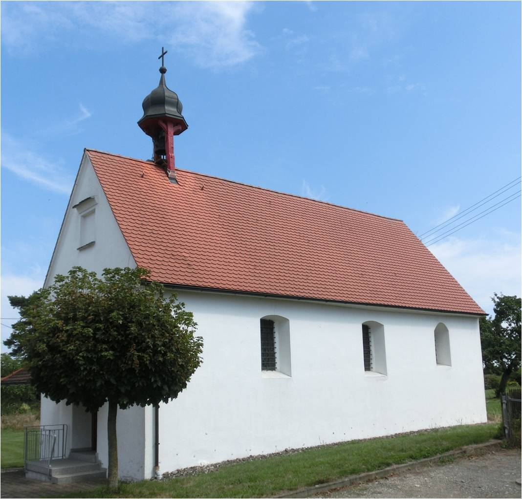 Deutschland (D) - Baden-Württemberg (BW) - Landkreis Sigmaringen (SIG) - Ostrach - Kalkreute: Außenansicht der Kapelle St. Wendelin